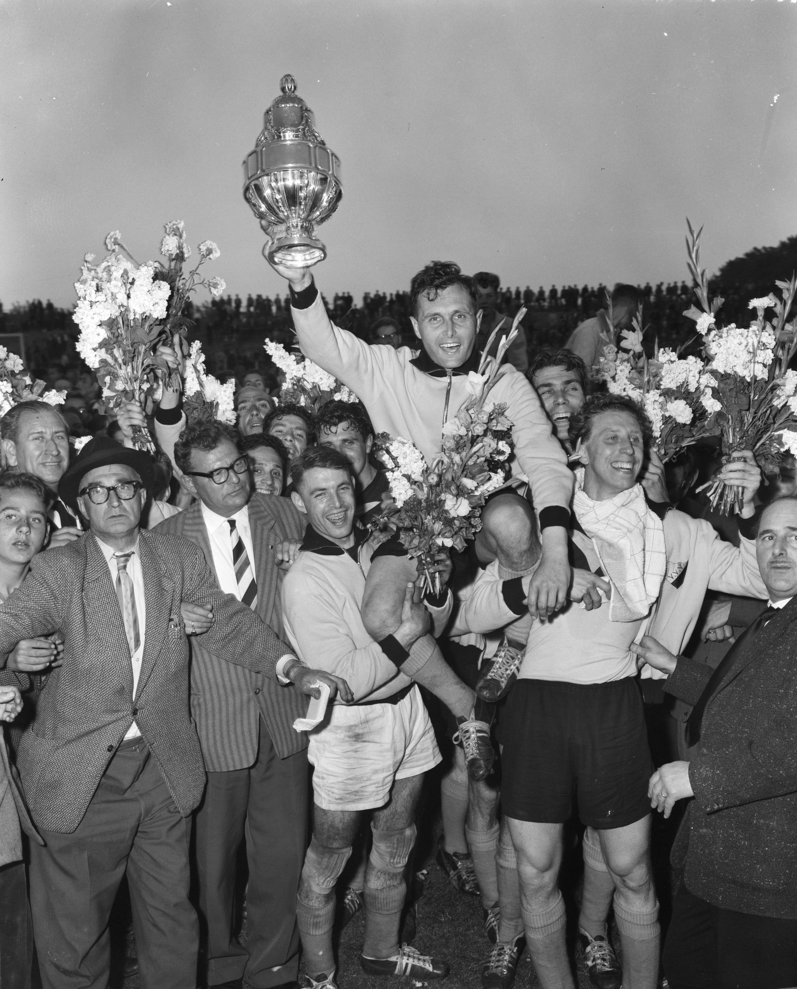 Collectie / Archief : Fotocollectie Anefo Reportage / Serie : [ onbekend ] Beschrijving : Finale KNVB beker : ADO tegen VVV 1-4. Gijs Nass, aanvoerder VVV, met de beker op de schouders van supporters en medespelers. Rechts met witte handdoek om de nek Jan Klaassens Datum : 17 juni 1959 Locatie : Den Haag Trefwoorden : voetbal Fotograaf : Pot, Harry / Anefo Auteursrechthebbende : Nationaal Archief Materiaalsoort : Negatief (zwart/wit) Nummer archiefinventaris : bekijk toegang 2.24.01.04 Bestanddeelnummer : 910-4499